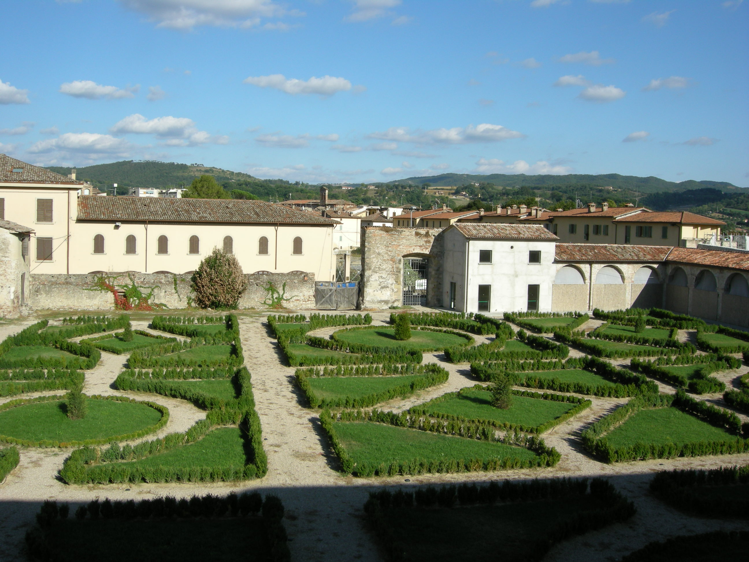 Palazzo vitelli alla cannoniera, giardino